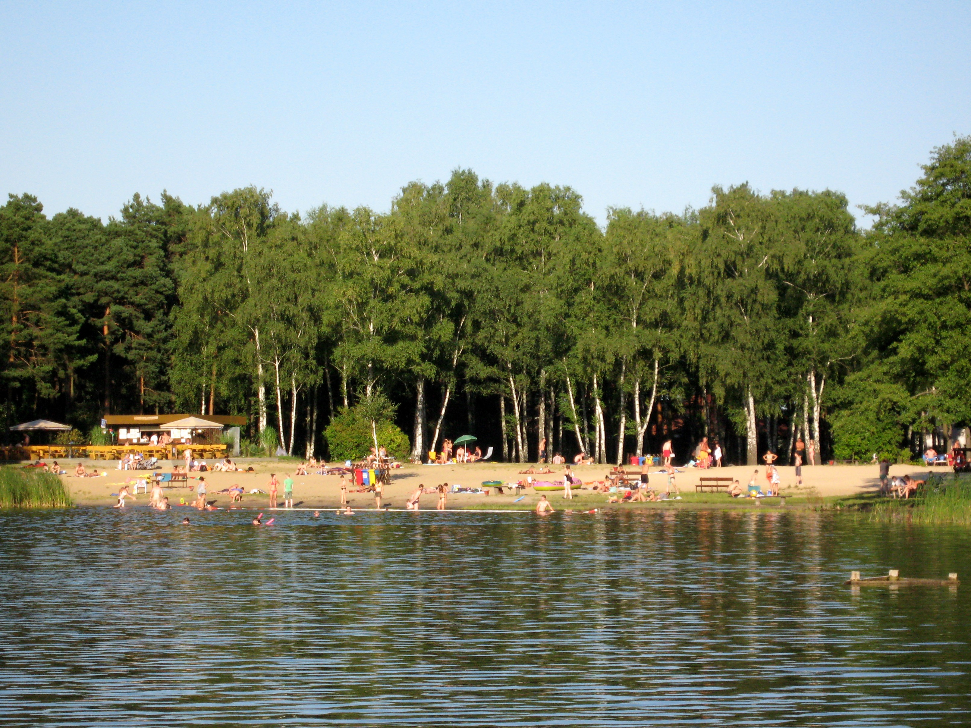 Stolzenhagener See im Ort Stolzenhagen in der Gemeinde Wandlitz, Landkreis Barnim, Land Brandenburg, Deutschland